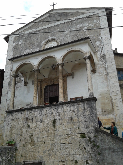 Chiesa di San Nicola